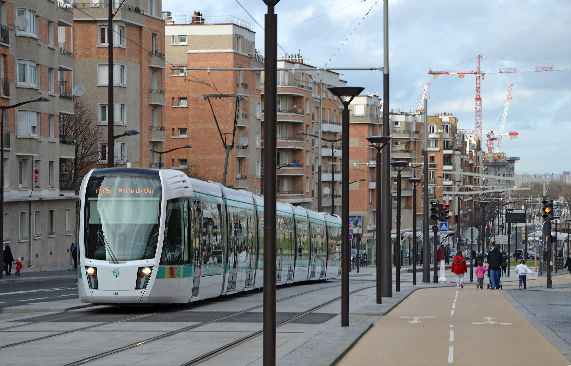 Rame de tramway de la ligne T3b boulevard d'Indochine près de la porte de Chaumont Paris, Ile de France, France